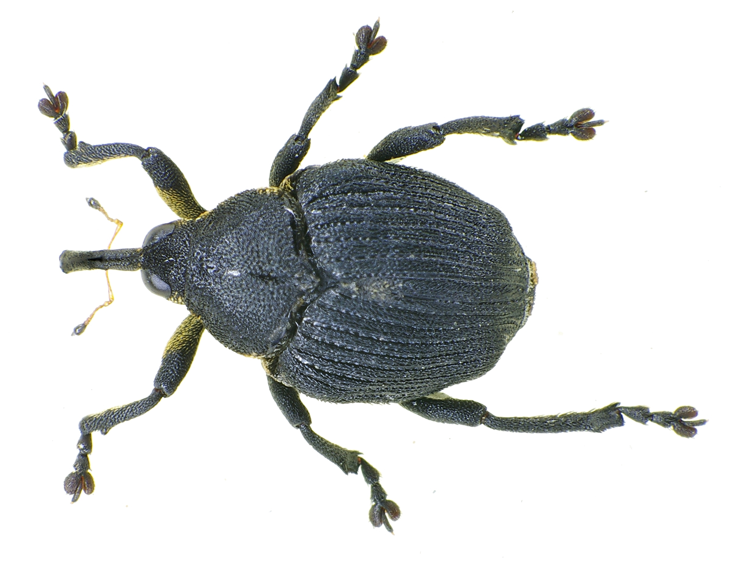 Mononychus punctumalbum from Southern Germany, female